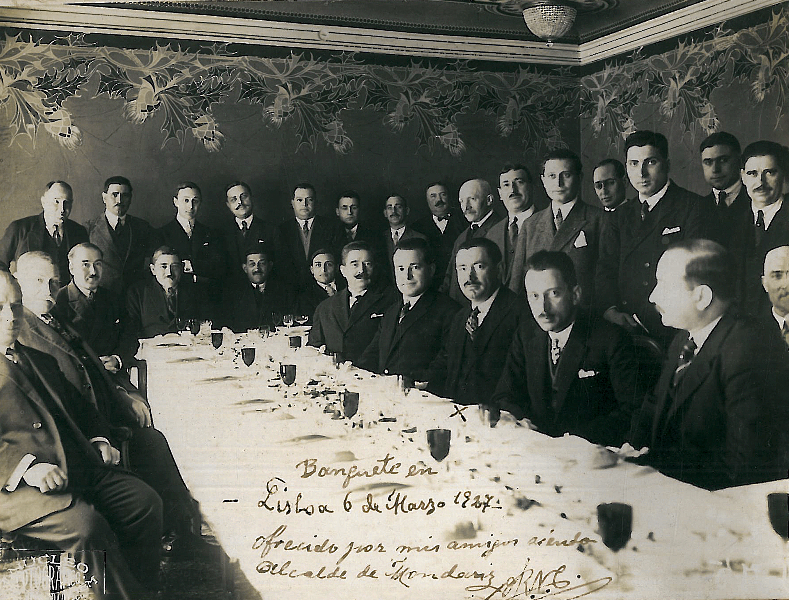 Banquete ofrecido no ano 1927 en Portugal a Ramiro Vidal Carrera. Xuventude de Galicia, siendo alcalde en Mondariz